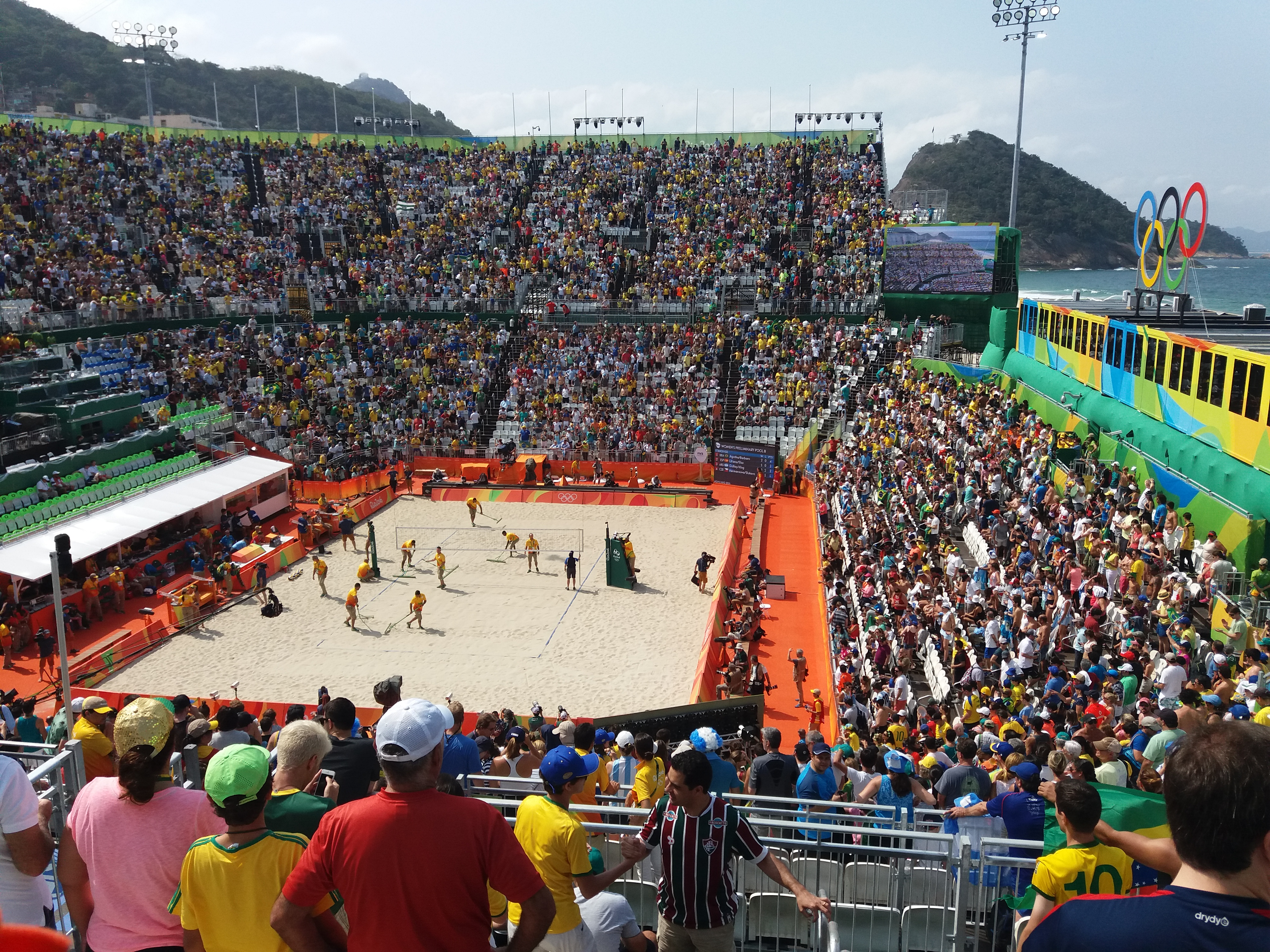 Esperando o jogo Brasil x Argentina começar